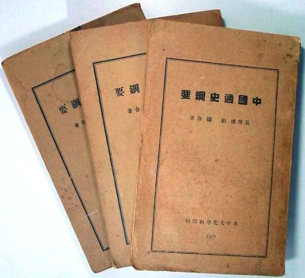 中文（香港）: 《中國通史綱要》三冊封面（1932-1934年初版嘅封面），過咗50年，進入公共領域。封面攝影嘅作者不明。